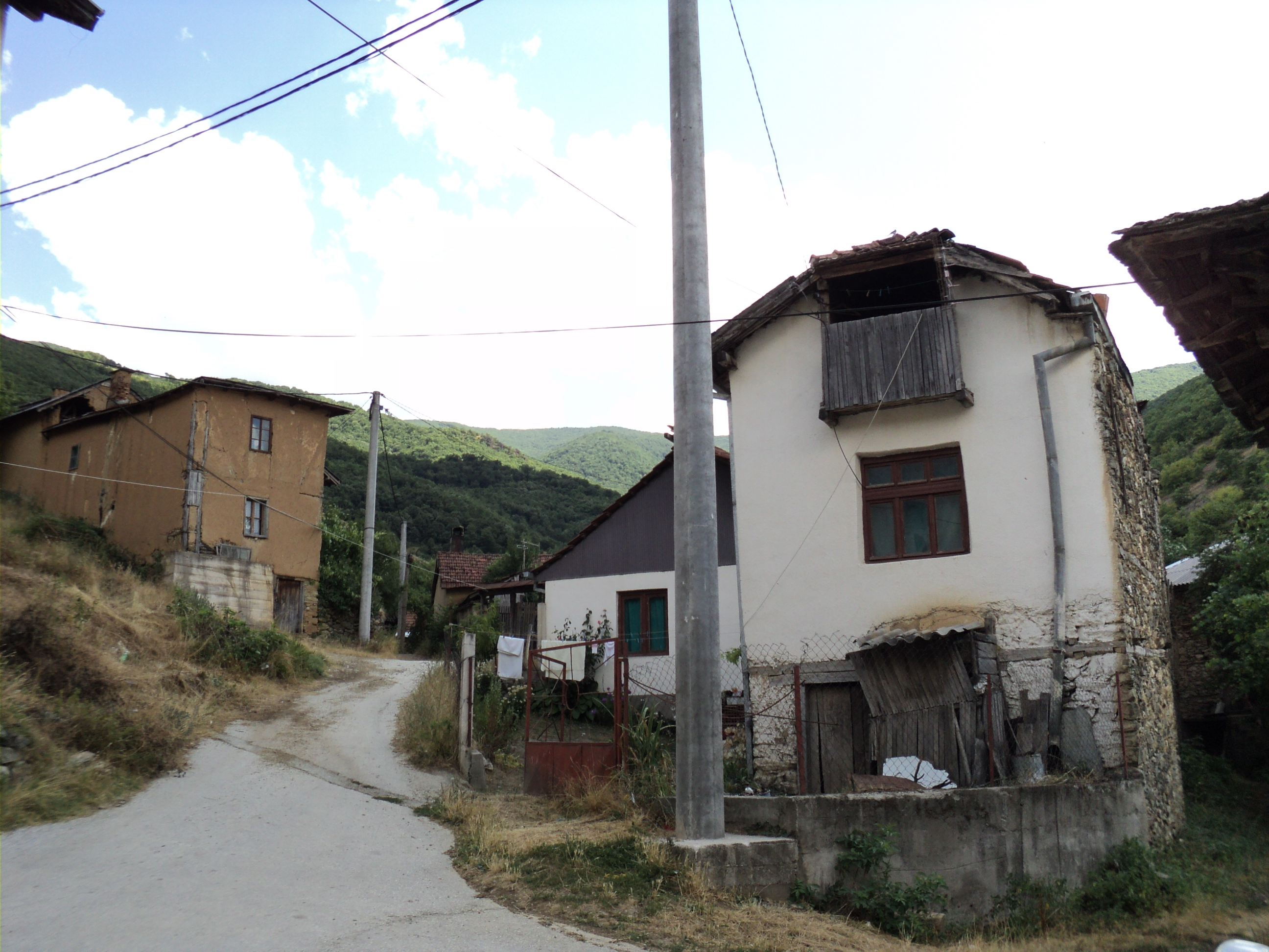 Centar sela Latova